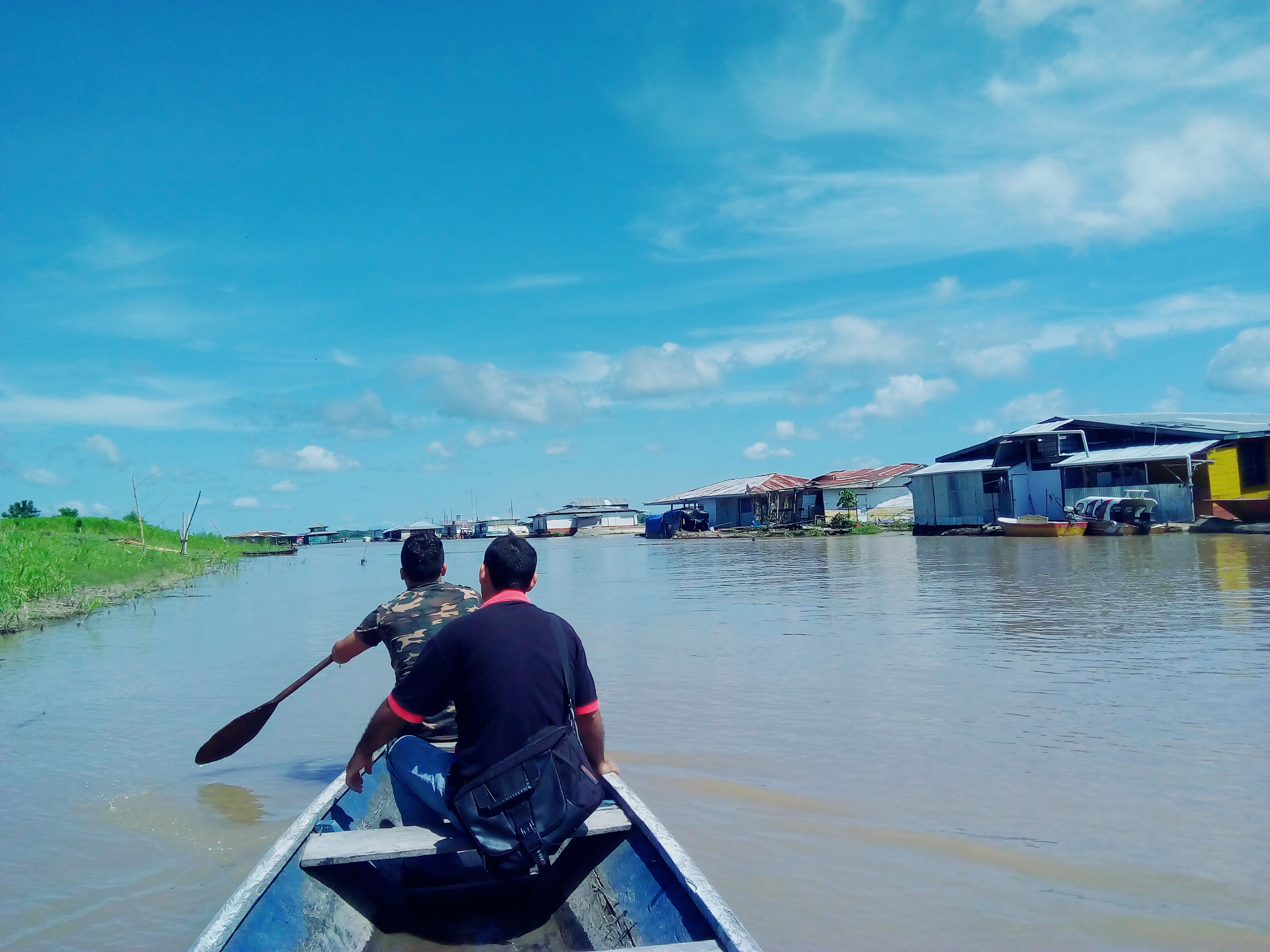 Balsas flotantes de ISR